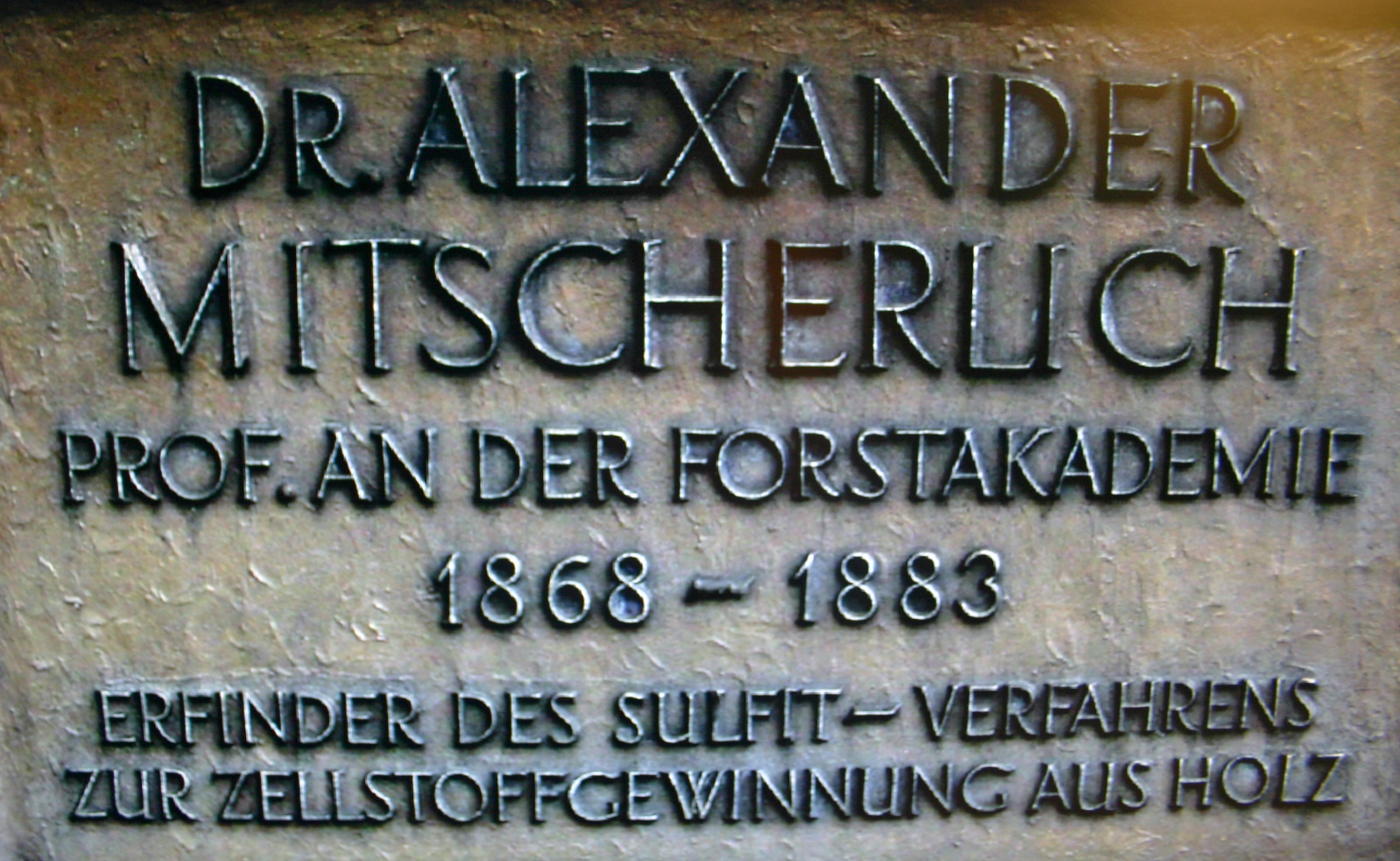 Platte auf dem Gedenkstein, den die Stadt Hannoversch Münden an der Stelle errichtet hat, an der früher das Institut von Alexander Mitscherlich stand.